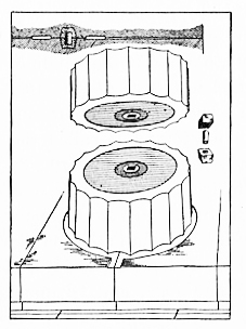 Système à empolia et poloi (broche métallique et clavette en bois) pour maintenir deux tambours de colonne dans les constructions de l'architecture grecque antique.